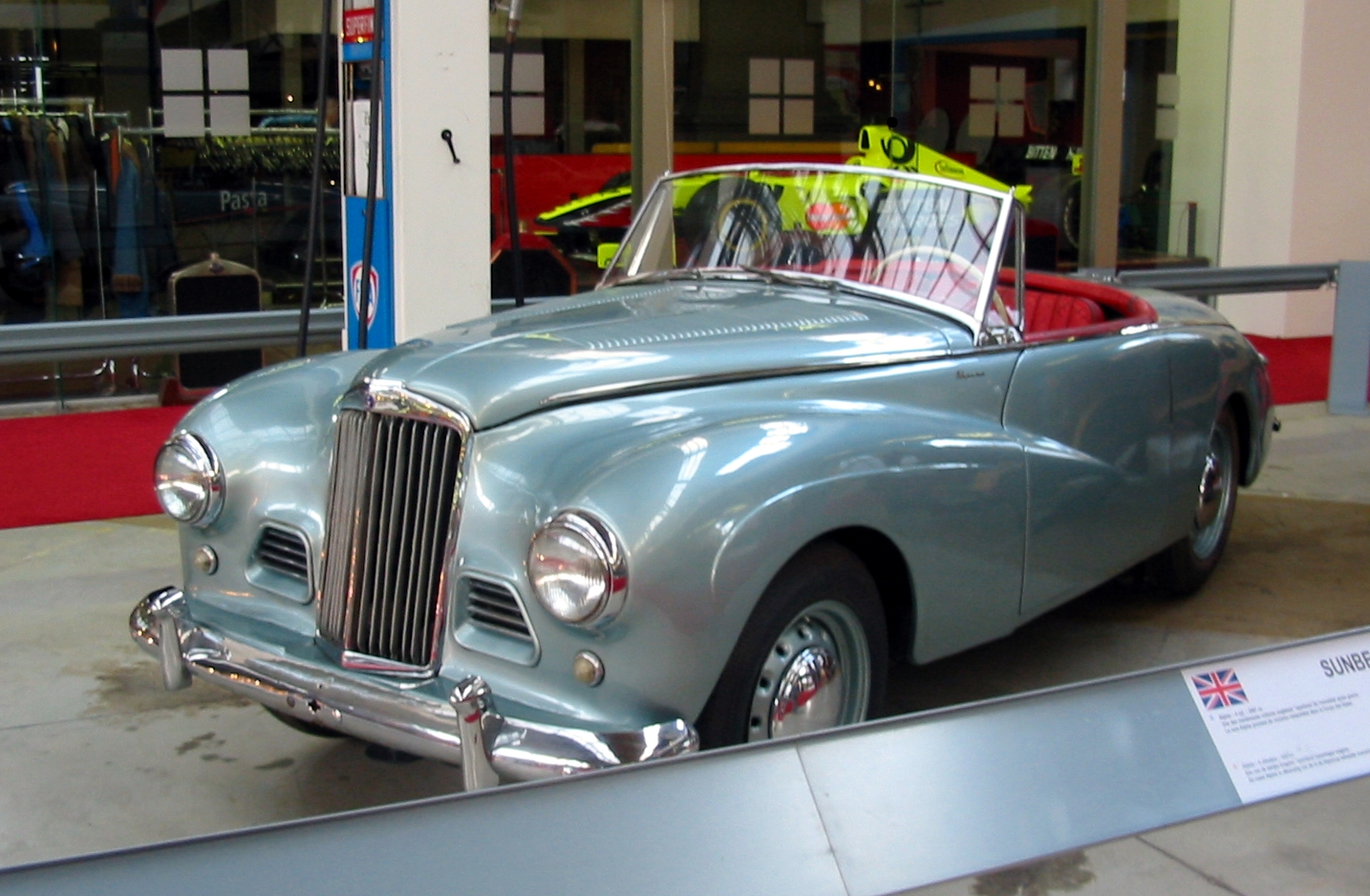 Sunbeam Alpine 1954